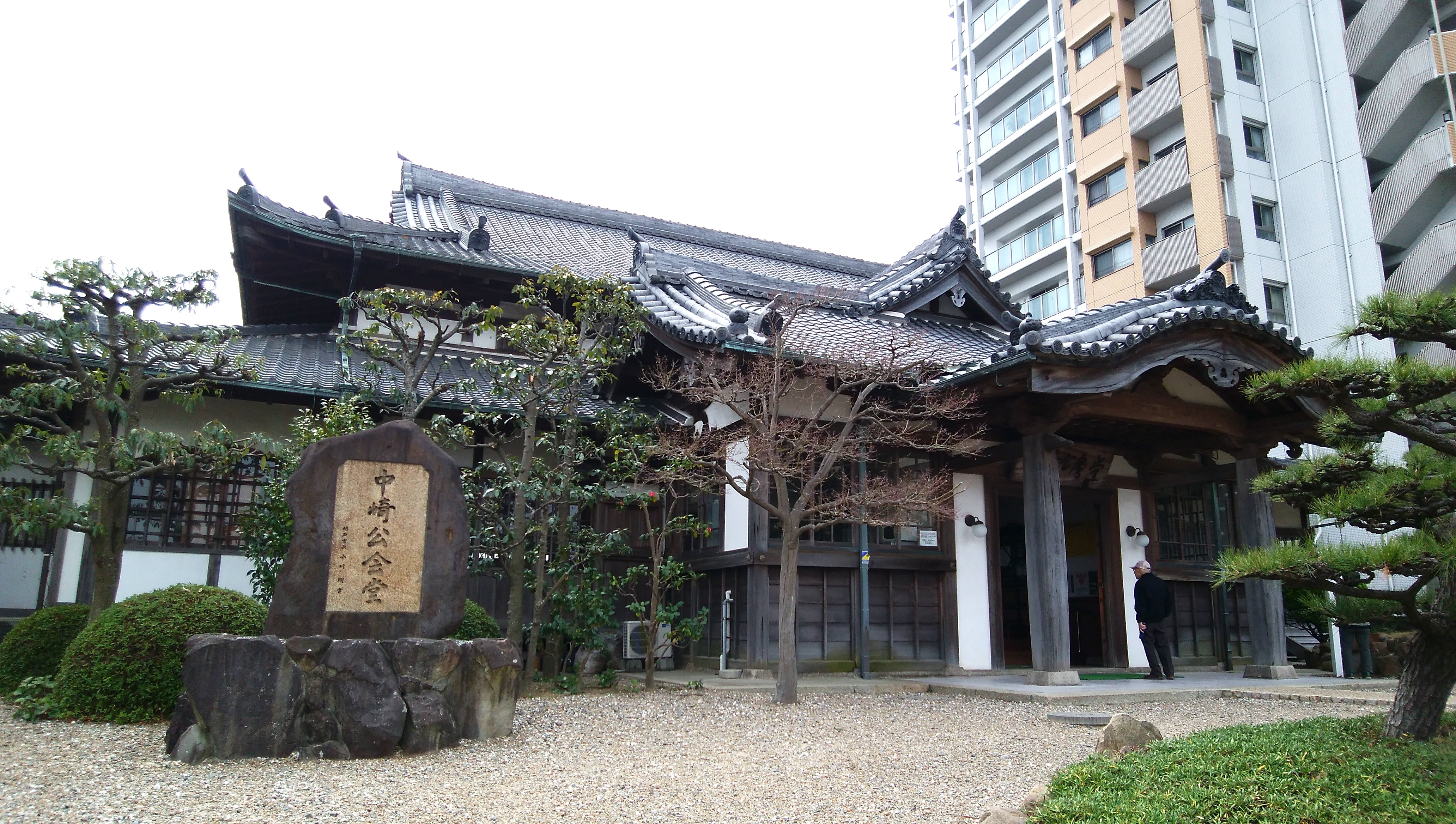 明石市にある中崎公会堂（左正面）